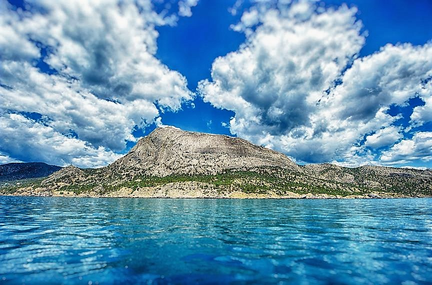 Судак